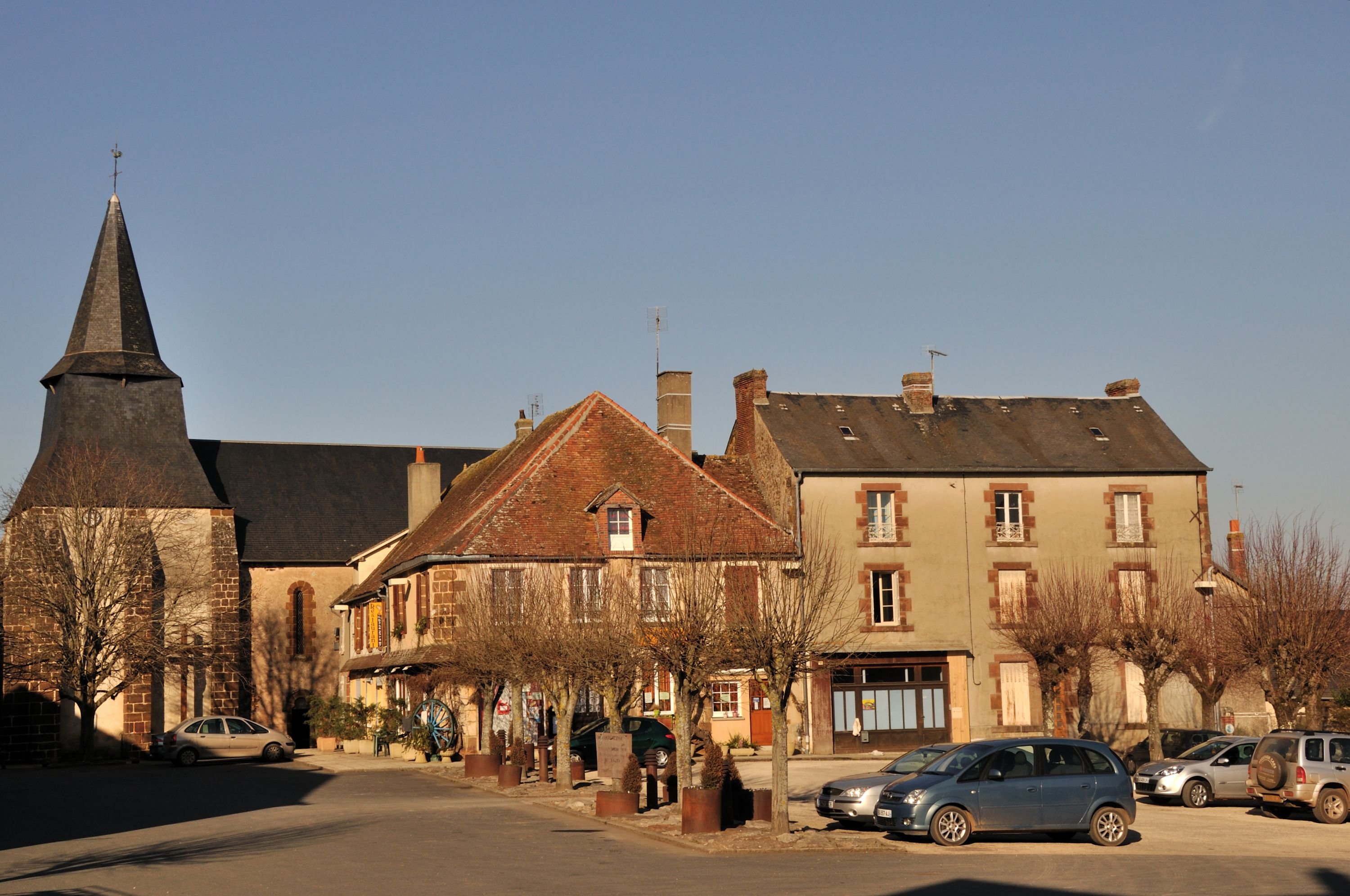 Chaillac (Indre) - Place centrale